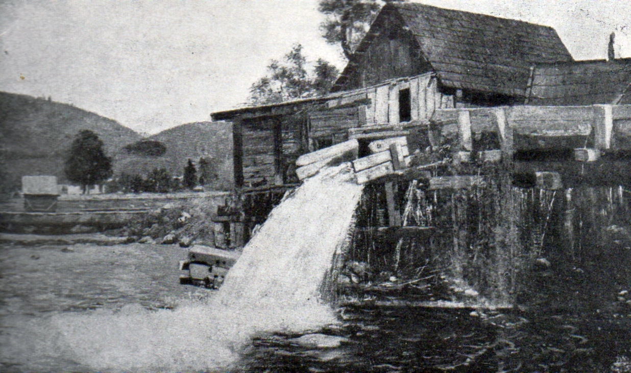 Moara din Broșteni